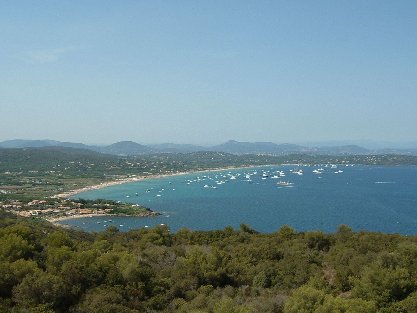 Les plages de Pampelone et Bonne Terrasse vues depuis le phare de Camarat